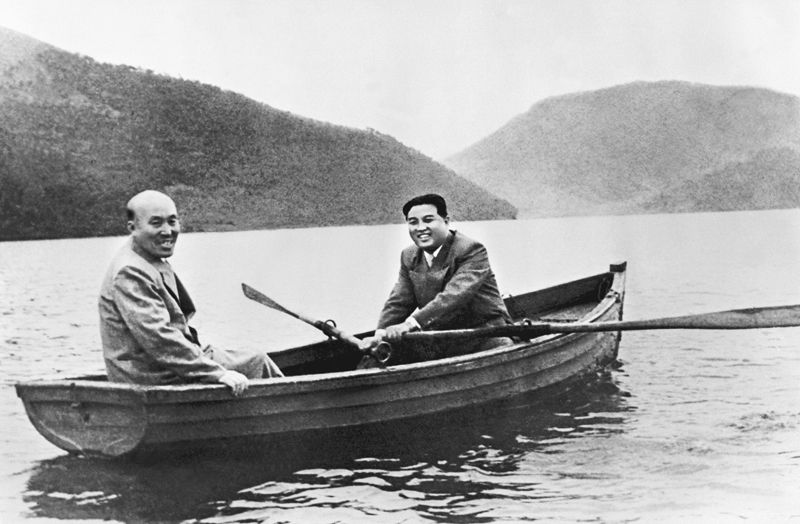 홍명희선생의 건강을 념려하시여 휴식의 한때를 마련하신 위대한 수령 김일성동지. 1958년 5월 5·1절 경축행사가 끝난 뒤 평양 교외 호수에서 김일성(오른쪽)과 홍명희가 뱃놀이를 하고 있는 모습.[1] 이 사진은 김정일이 16세때 찍은 것으로 알려져 있다.[2]